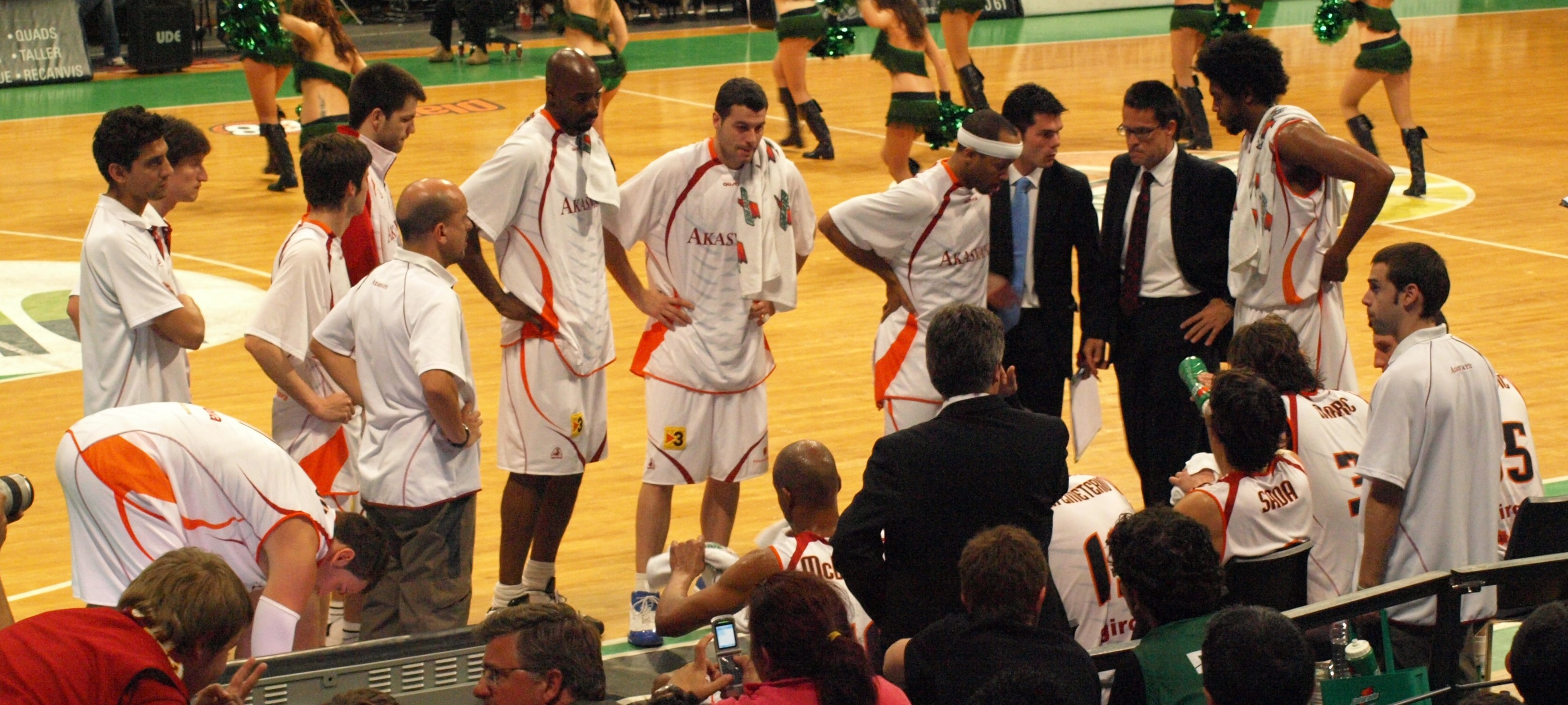 Plantilla del Akasvayu durante un tiempo muerto en los play-offs de la liga ACB 07-08 en el Pabellón Olímpico de Badalona